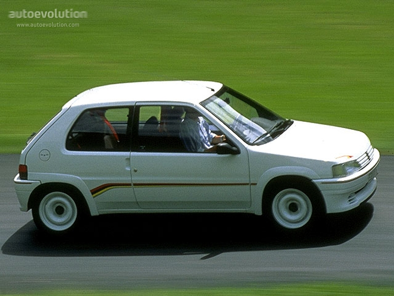 rallye